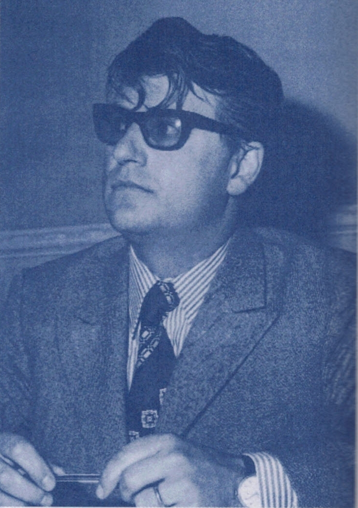 Guglielmo / Viljem Cerno, 1973